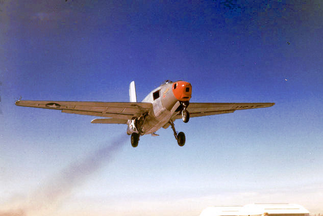 aahs_p005688.